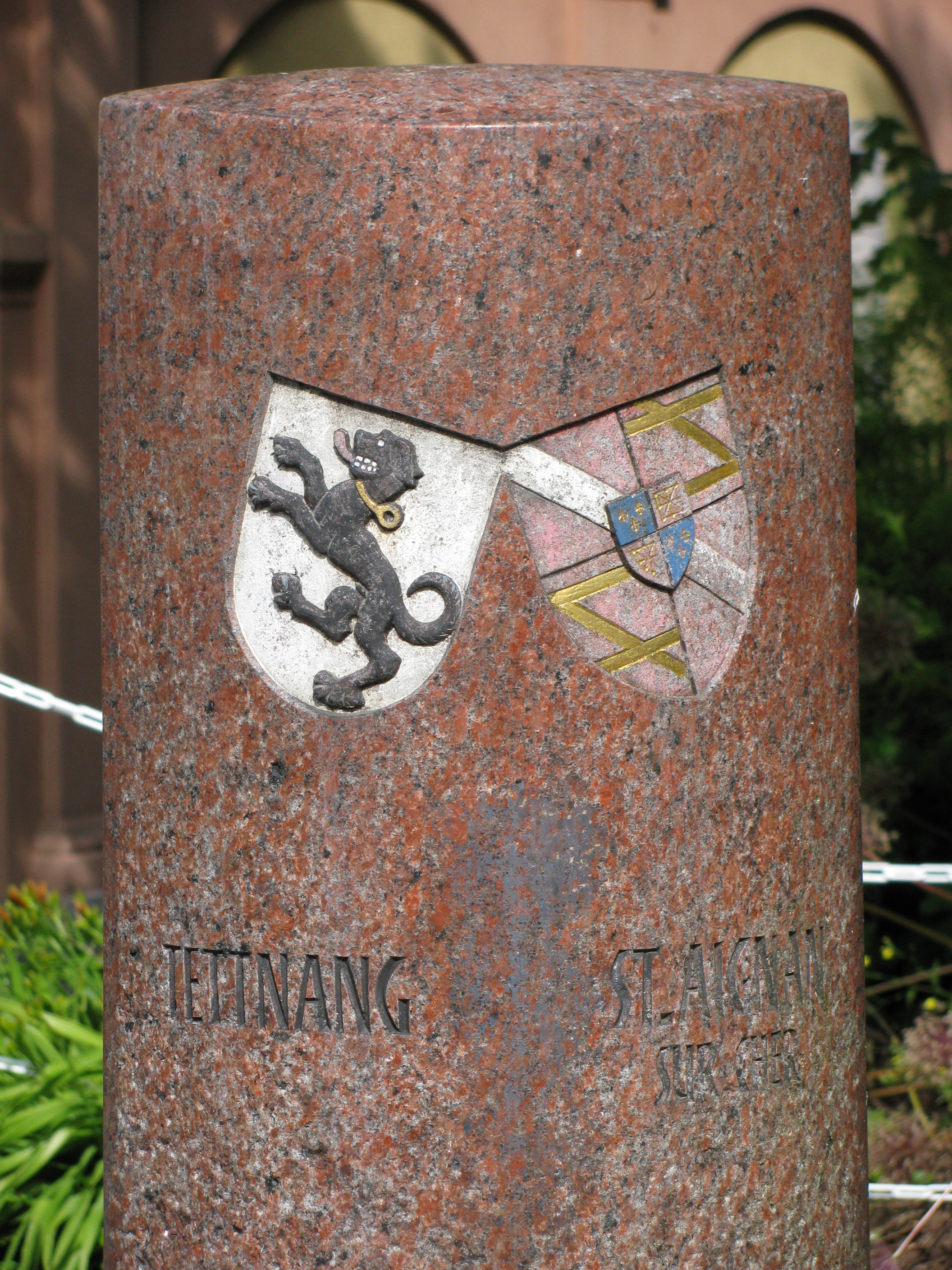 Deutschland - Baden-Württemberg - Bodenseekreis - Tettnang: Gedenkstein "Städtepartnerschaft Tettnang - Saint-Aignan-sur-Cher"; Standort: am Montfortplatz, zwischen St.-Georgs-Kapelle und Neuem Schloss